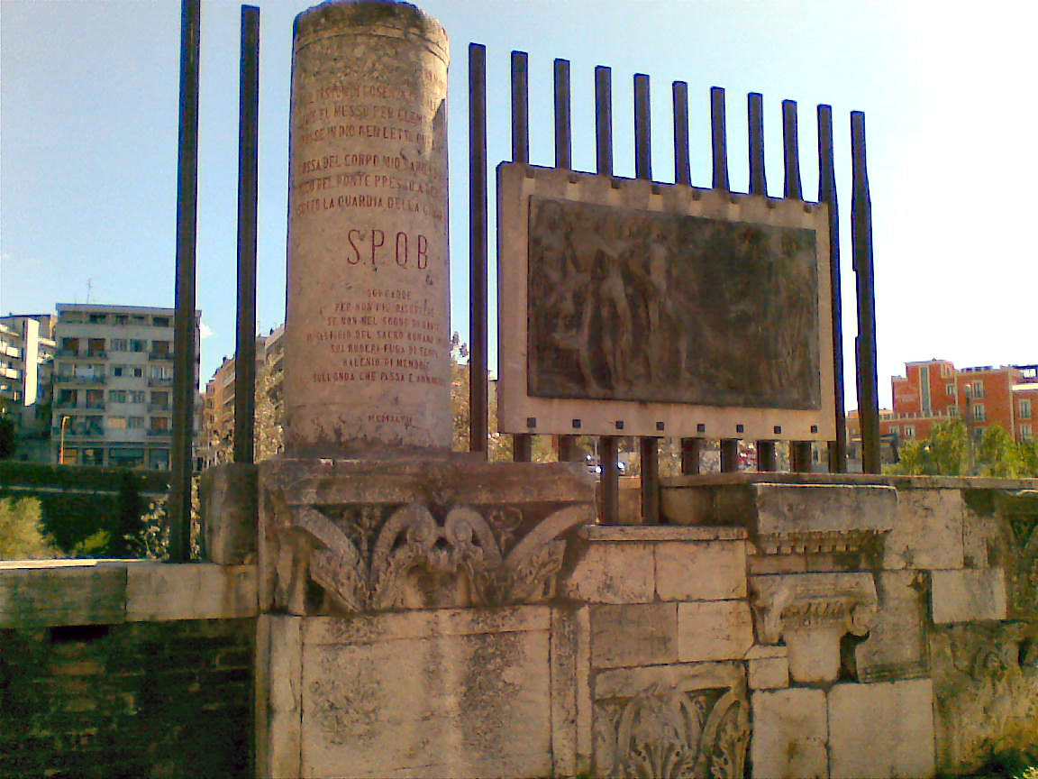 L'epigrafe in memoria di Manfredi di Svevia con i versi di Dante Alighieri, al Ponte Vanvitelli di Benevento